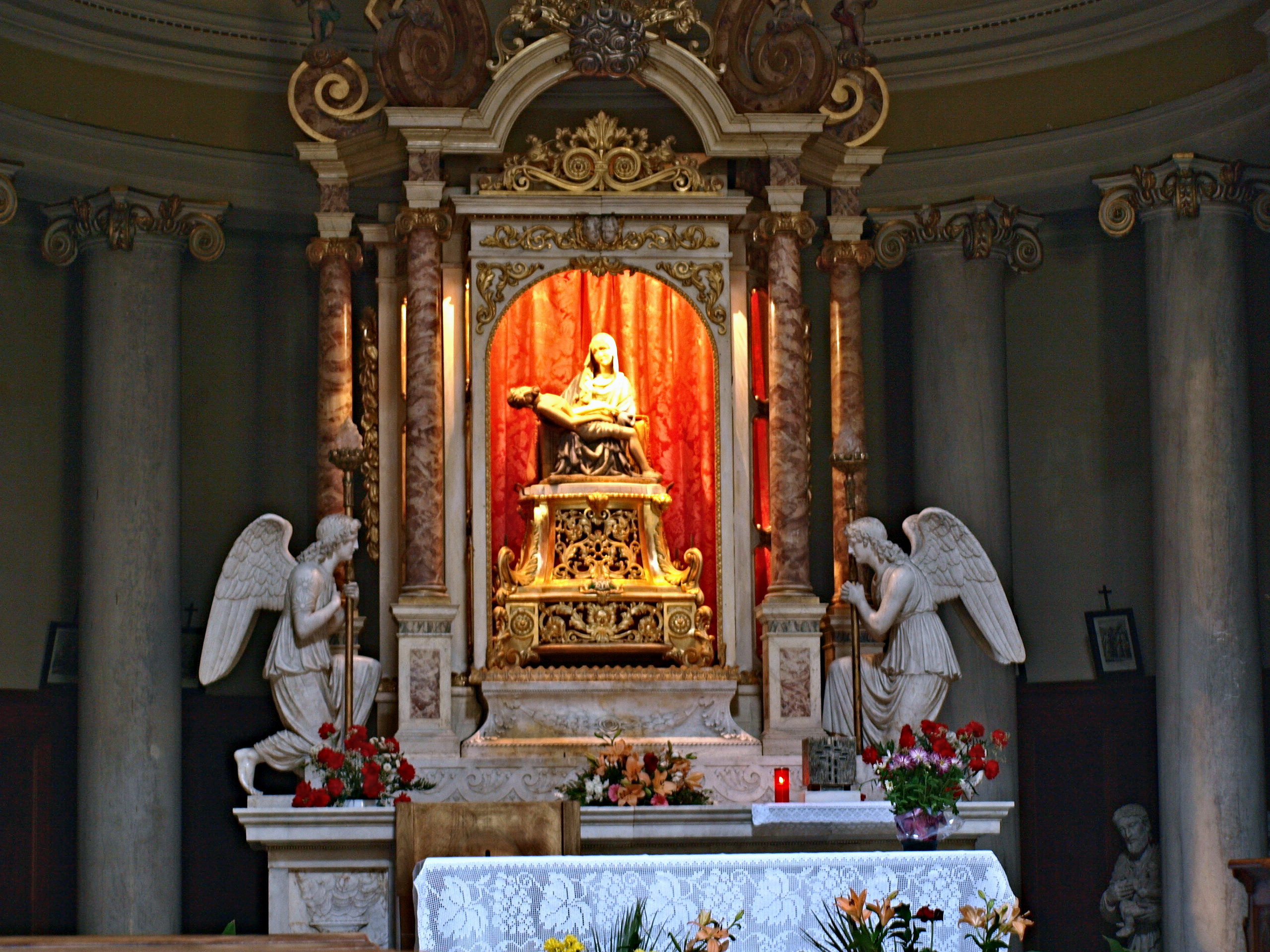 Cavalese